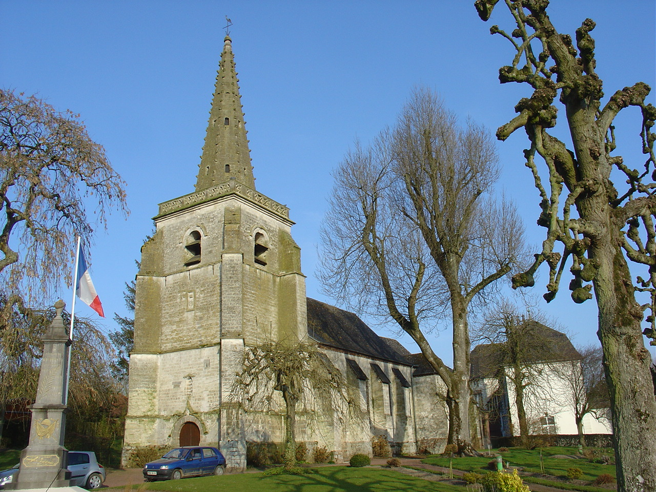 Église de Boubers-sur-Canche